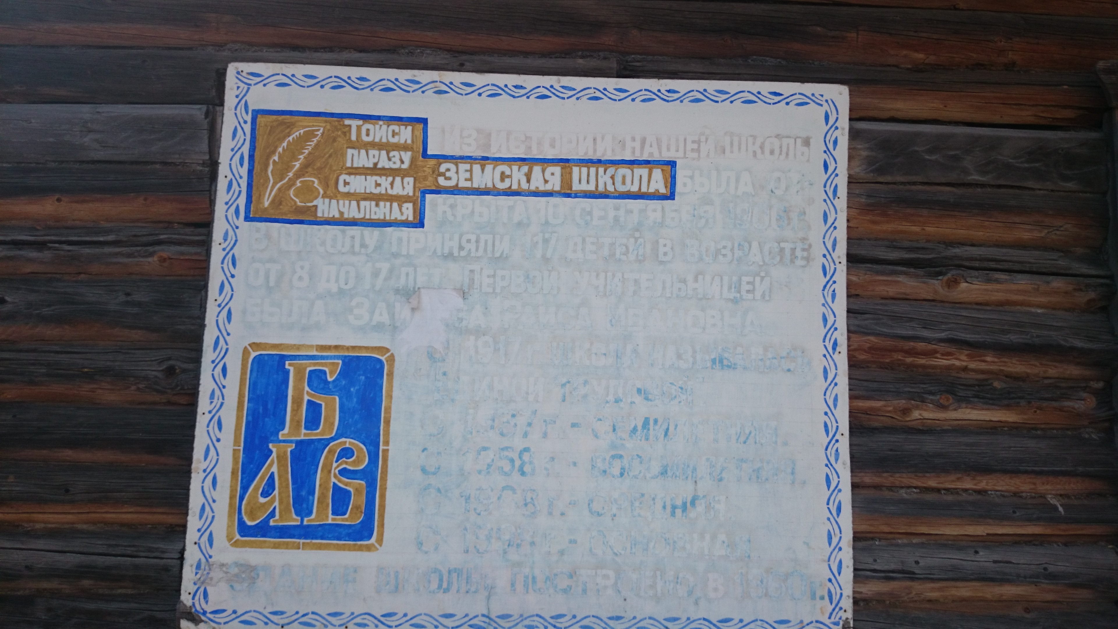 История Тойси-Паразусинской школы на плакете